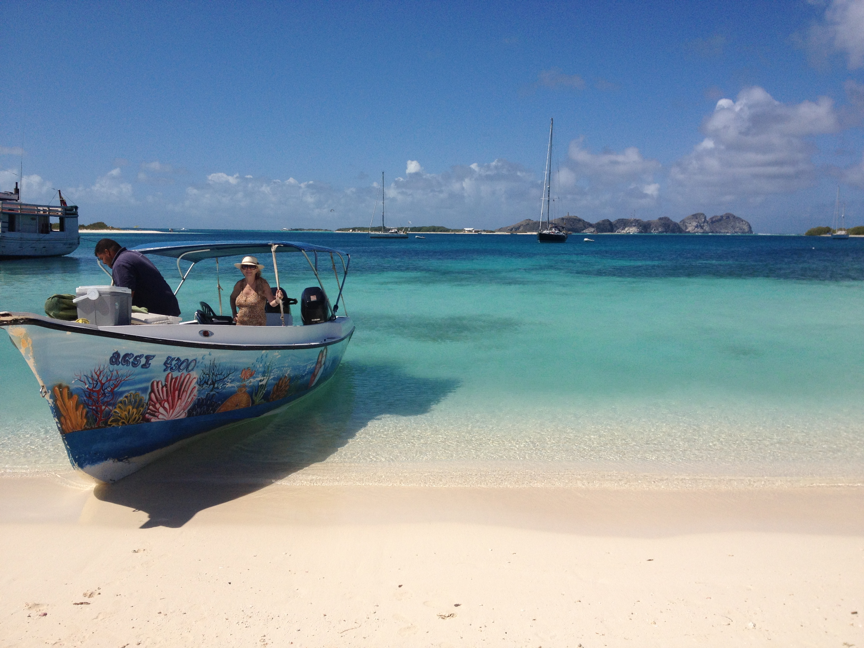 Un día en el paraíso de Los Roques